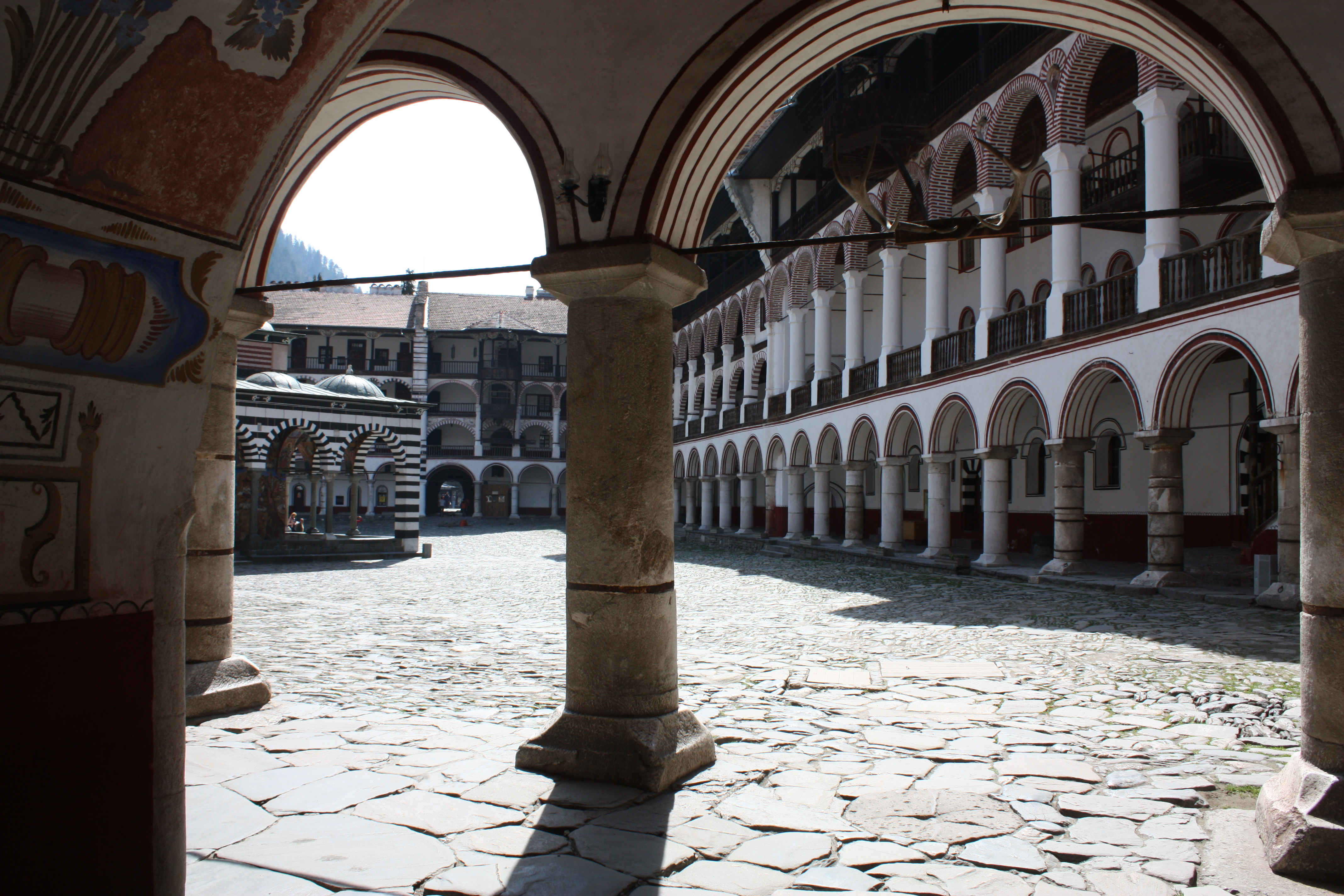 Rila Monastery, Rilakloster, Kloster Rila, Рилски манастир, Bulgaria